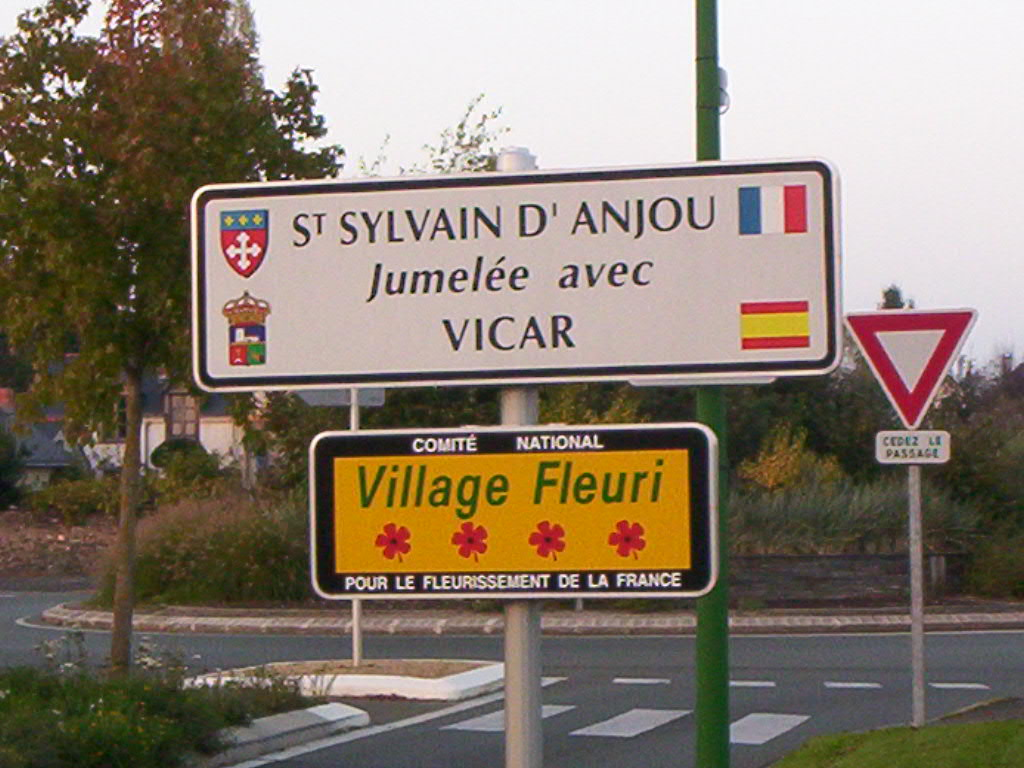 Panneau de jumelage et panneau village fleuri de la commune Saint Sylvain d'Anjou